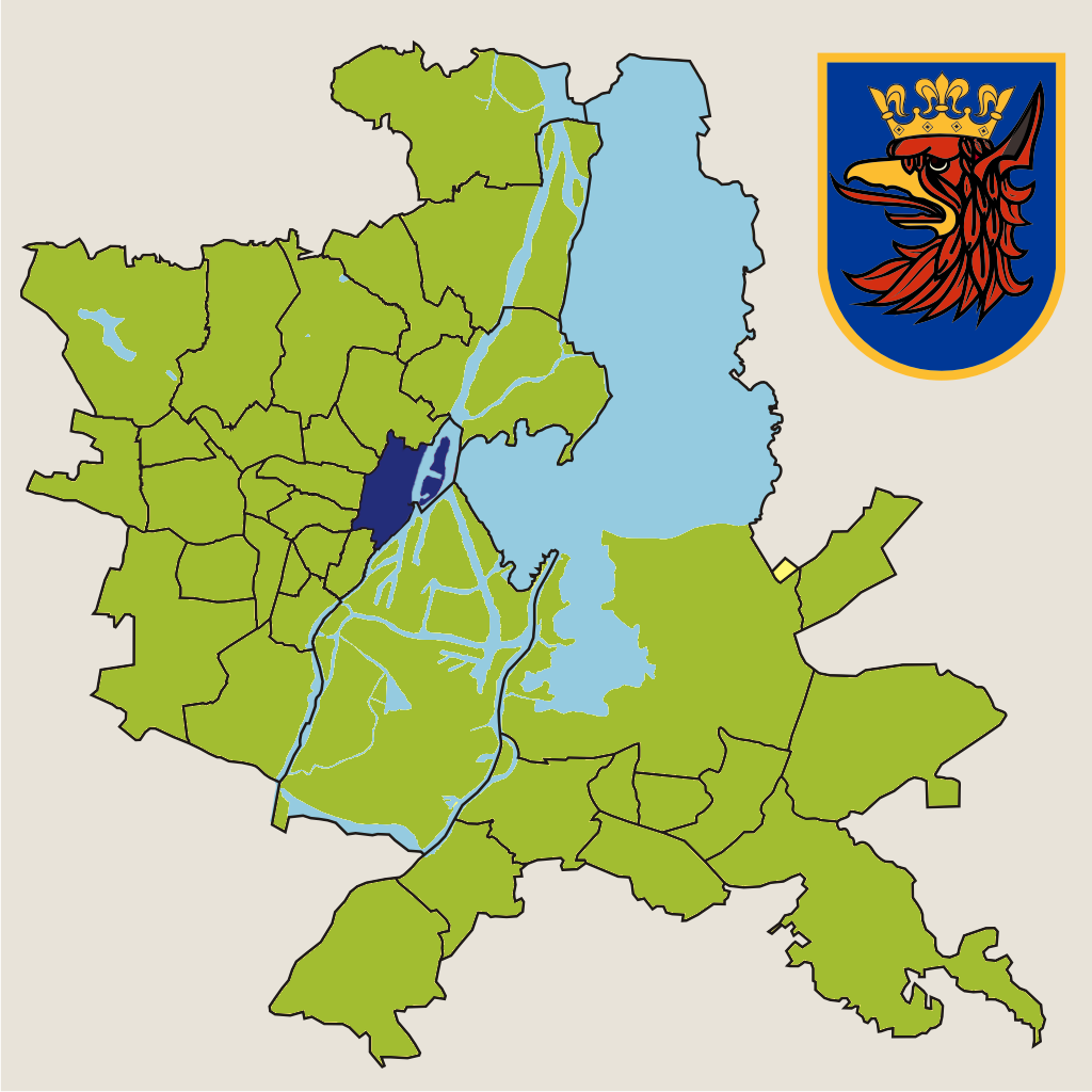 Osiedle "Drzetowo-Grabowo" w Szczecinie – jednostka pomocnicza miasta w 2010